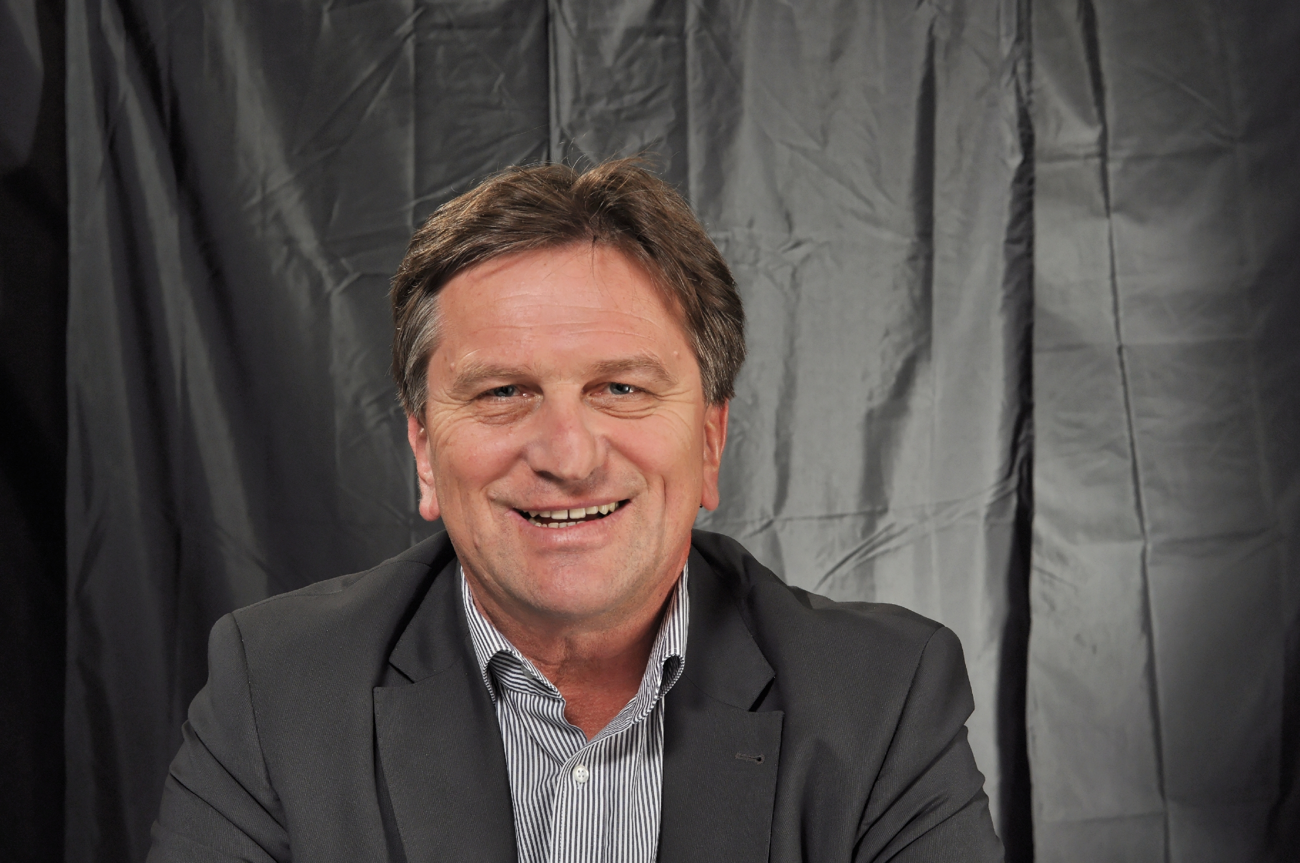 Manfred Lucha 2013 Personality rights warning Although this work is freely licensed or in the public domain, the person(s) shown may have rights that legally restrict certain re-uses unless those depicted consent to such uses. In these cases, a model release or other evidence of consent could protect you from infringement claims.